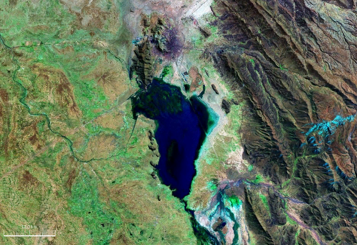 Vista satelital del lago Uru Uru ubicado en el departamento de Oruro, tambien se puede observar al norte del lago la mancha urbana de la ciudad de Oruro.